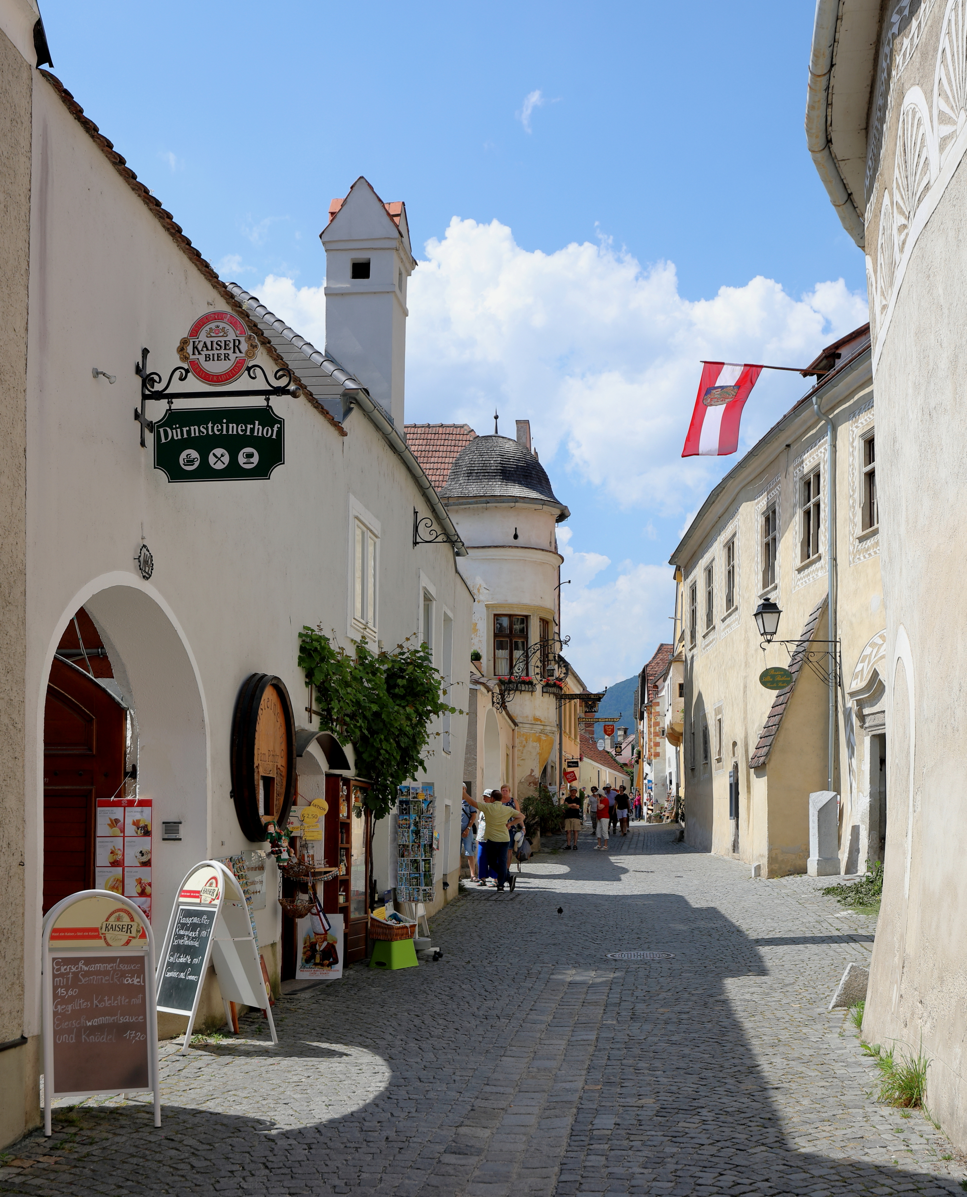 Ortszentrum der niederösterreichischen Stadt Dürnstein bzw. die „Hauptstraße“ auf Höhe des Rathauses (Gemeindeamtes).